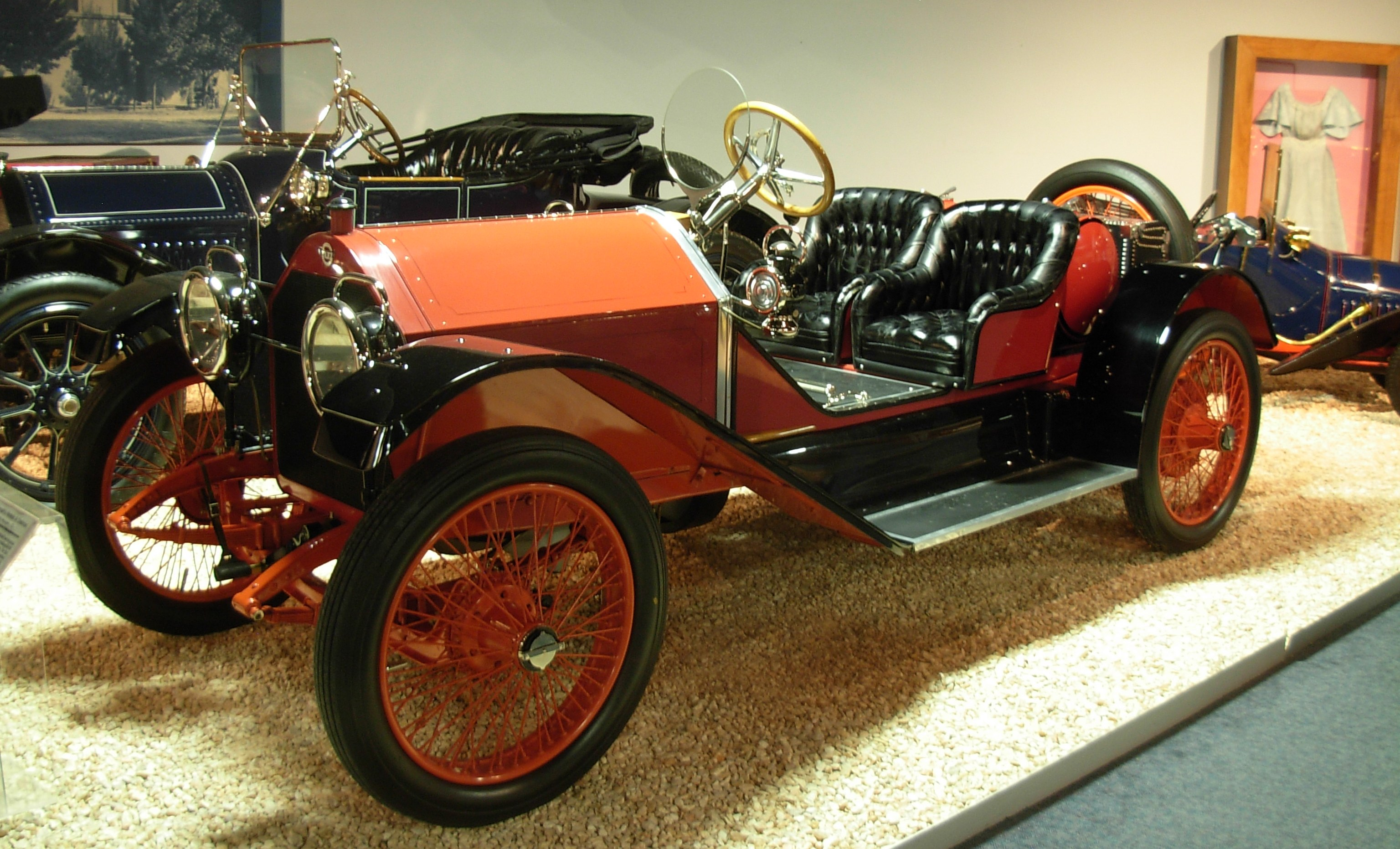 1913 Stutz Series B Bearcat National Automobile Museum, Lake St, Reno, Nevada, USA.